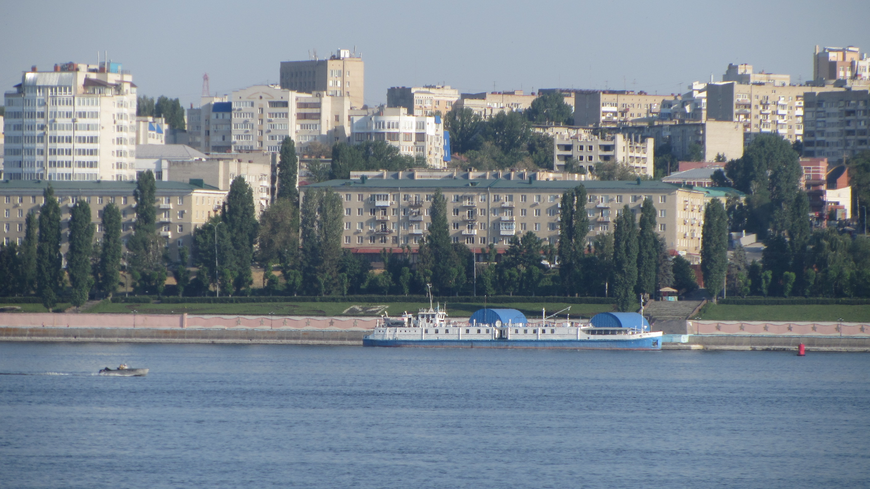 Набережная Космонавтов, Волжский район, Саратов. Volzhskiy rayon, Saratov, Saratovskaya oblast', Russia